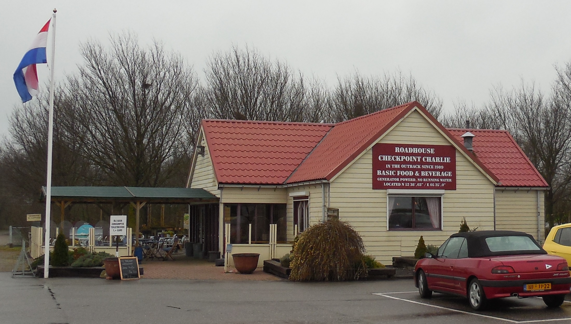 Rasthaus "Roadhouse Checkpoint Charlie" am Houtribdijk (Houtribdeich/Markerwaarddeich), IJsselmeer, Niederlande